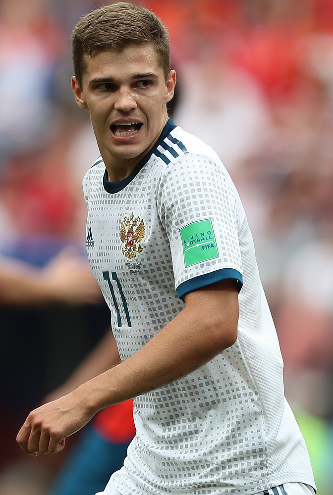 История творится на наших глазах! Россия бьет Испанию в серии пенальти